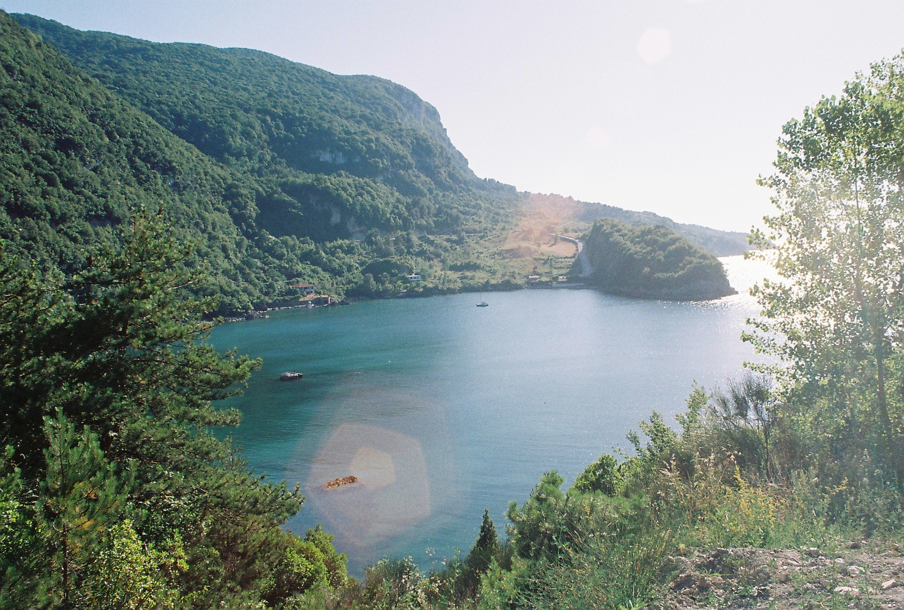 Gideros Bay,Cide,Kastamonu,Turkey